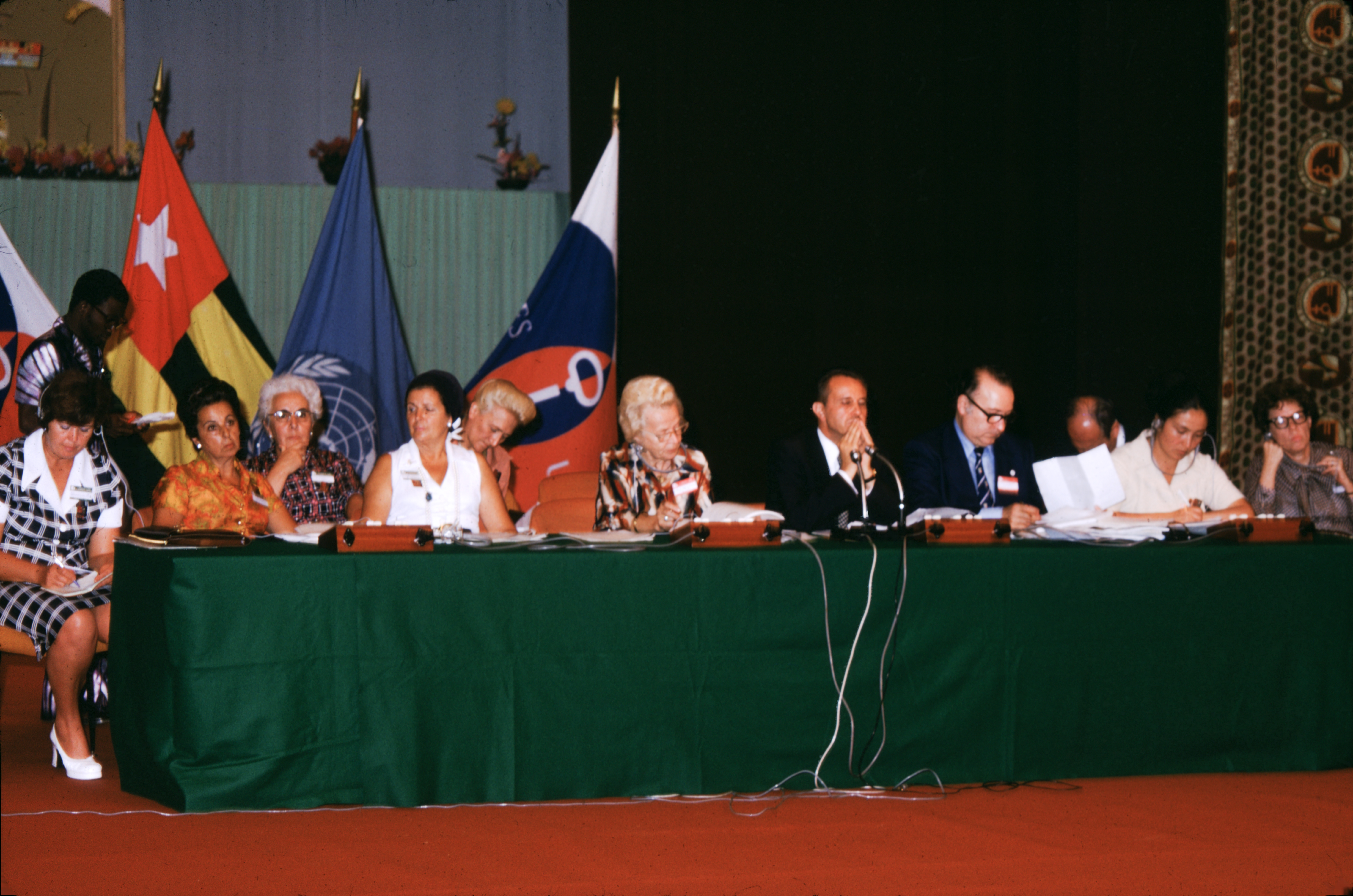 Colloque sur la promotion de la femme face aux responsabilités communales, organisé par la Fédération mondiale des Villes jumelées à Lomé au Togo du 26 au 31 juillet 1975.